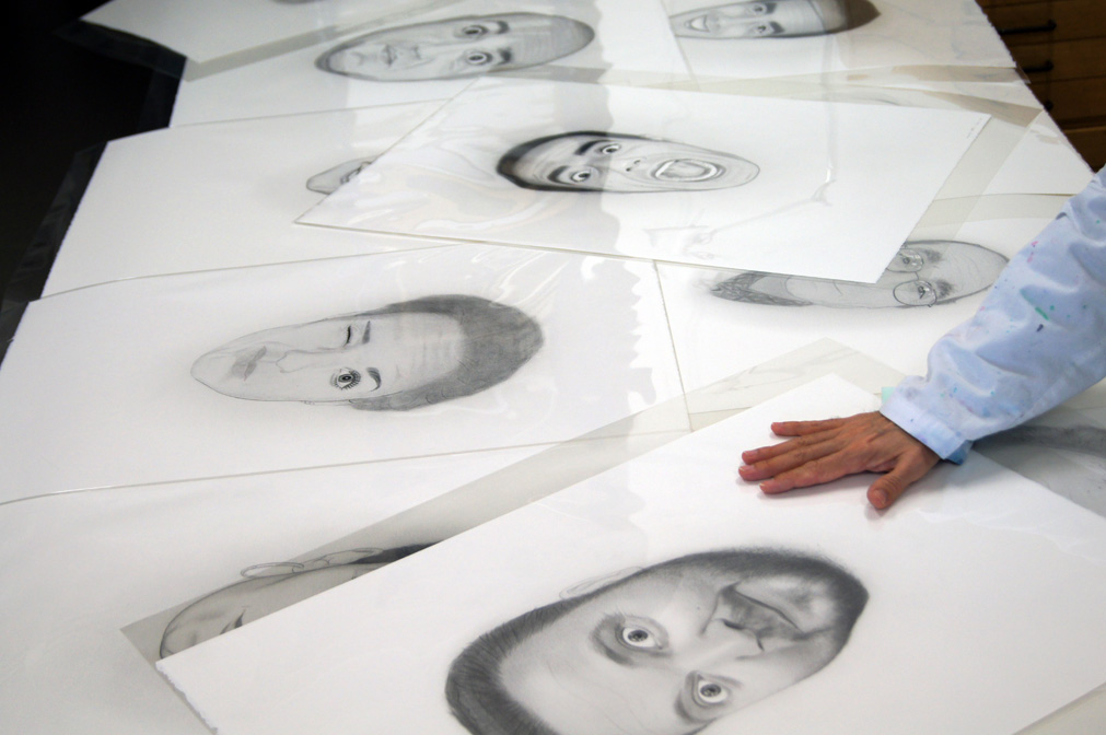 Vista de retratos de Mánuel Sáez en el estudio del artista, Valencia, 2012